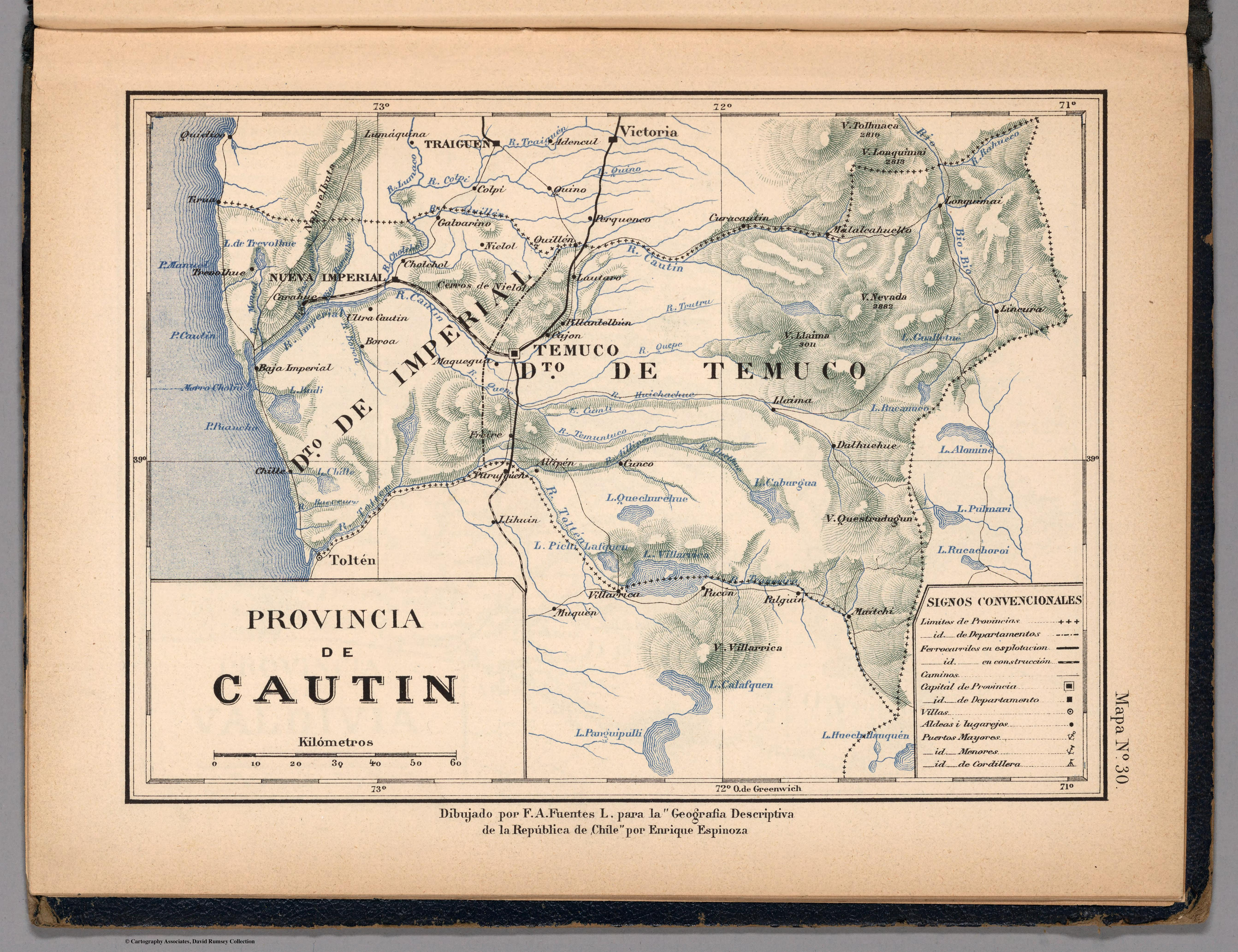 Atlas de Chile Arreglado para la Jeografia Descriptiva de la Republica de Chile por Enrique Espinoza.